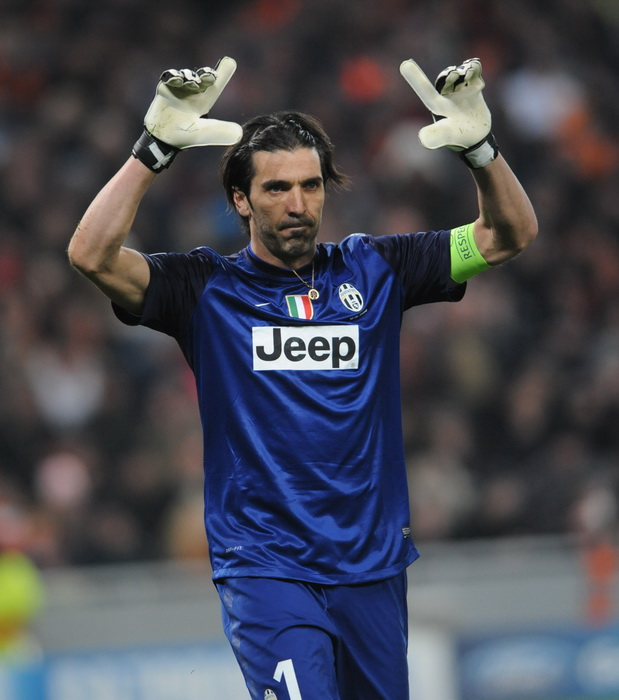 Buffon Super portiere il Numero 1Lëtzebuergesch: De Buffon 2012 am Match Shakhtar Donetsk - Juventus